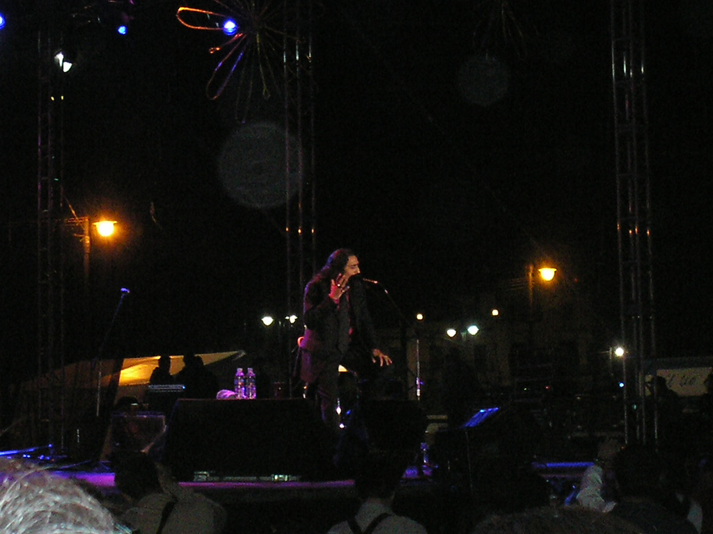 El cigala, mu bueno el concierto